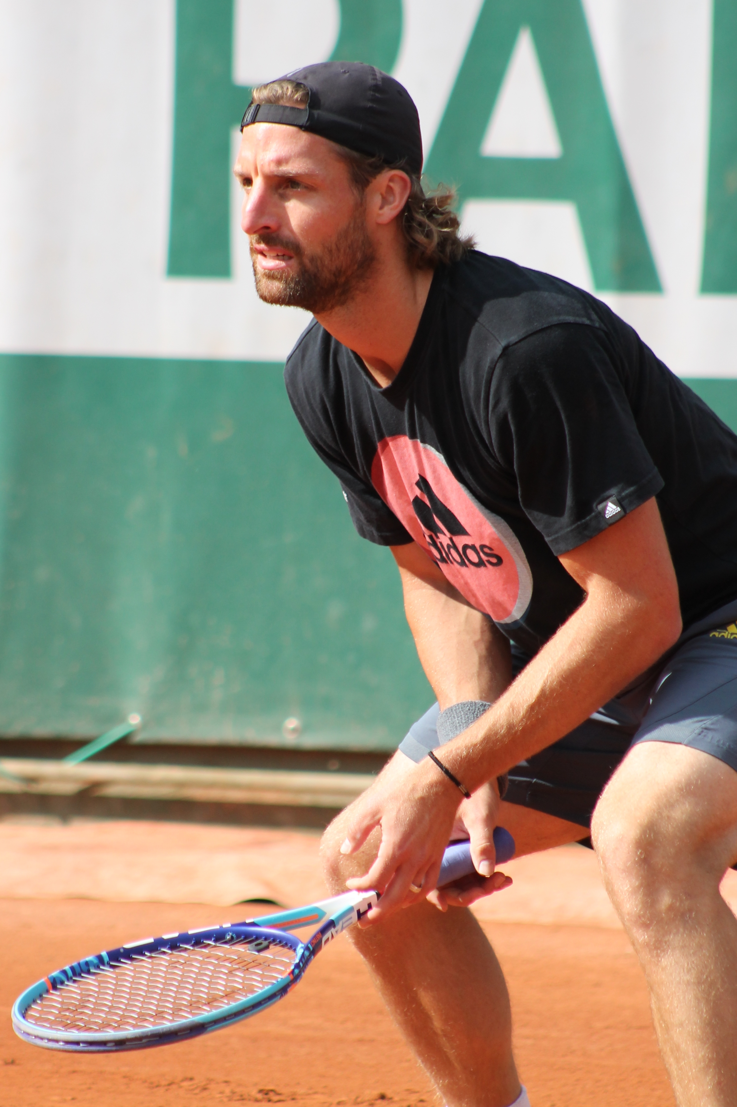 Begemann RG15